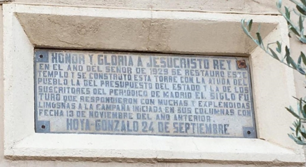 Placa en la iglesia de Hoya Gonzalo